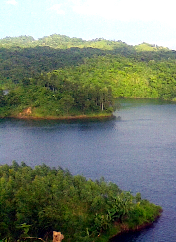 মহামায়ালেক, চট্টগ্রাম